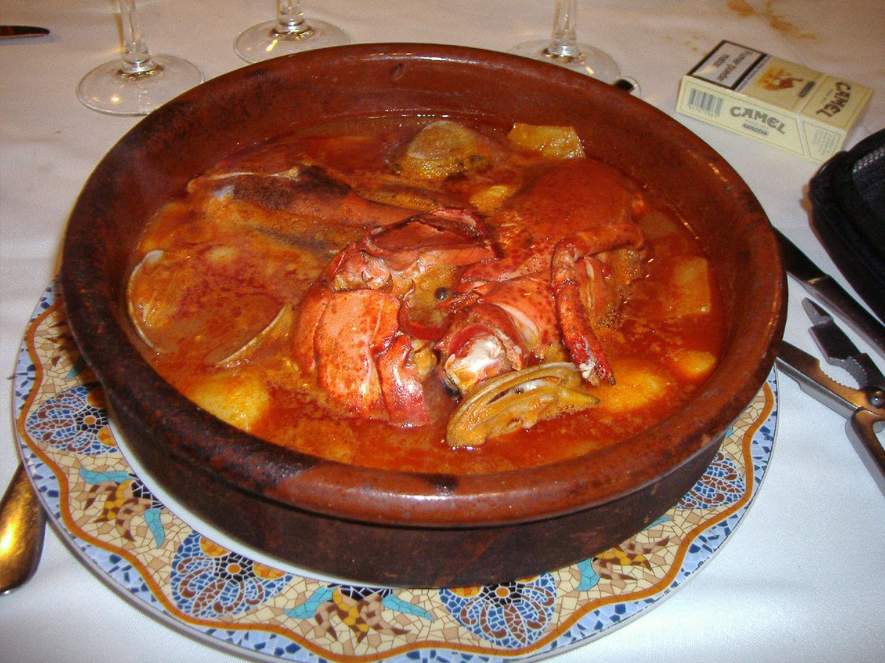 "Suquet" de pescado Ingredientes Un tomate. Ajo y perejil. La clase de pescado que se prefiera. Azafrán. Preparación Primero sofreír el tomate partido por la mitad, después el ajo y el perejil picado pequeño, cuando esté todo frito, echarle el agua, el pescado, dándole vueltas con cuidado para que no se desmenuce y cuando ya casi esté (unos 10 minutos), echarle el azafrán.